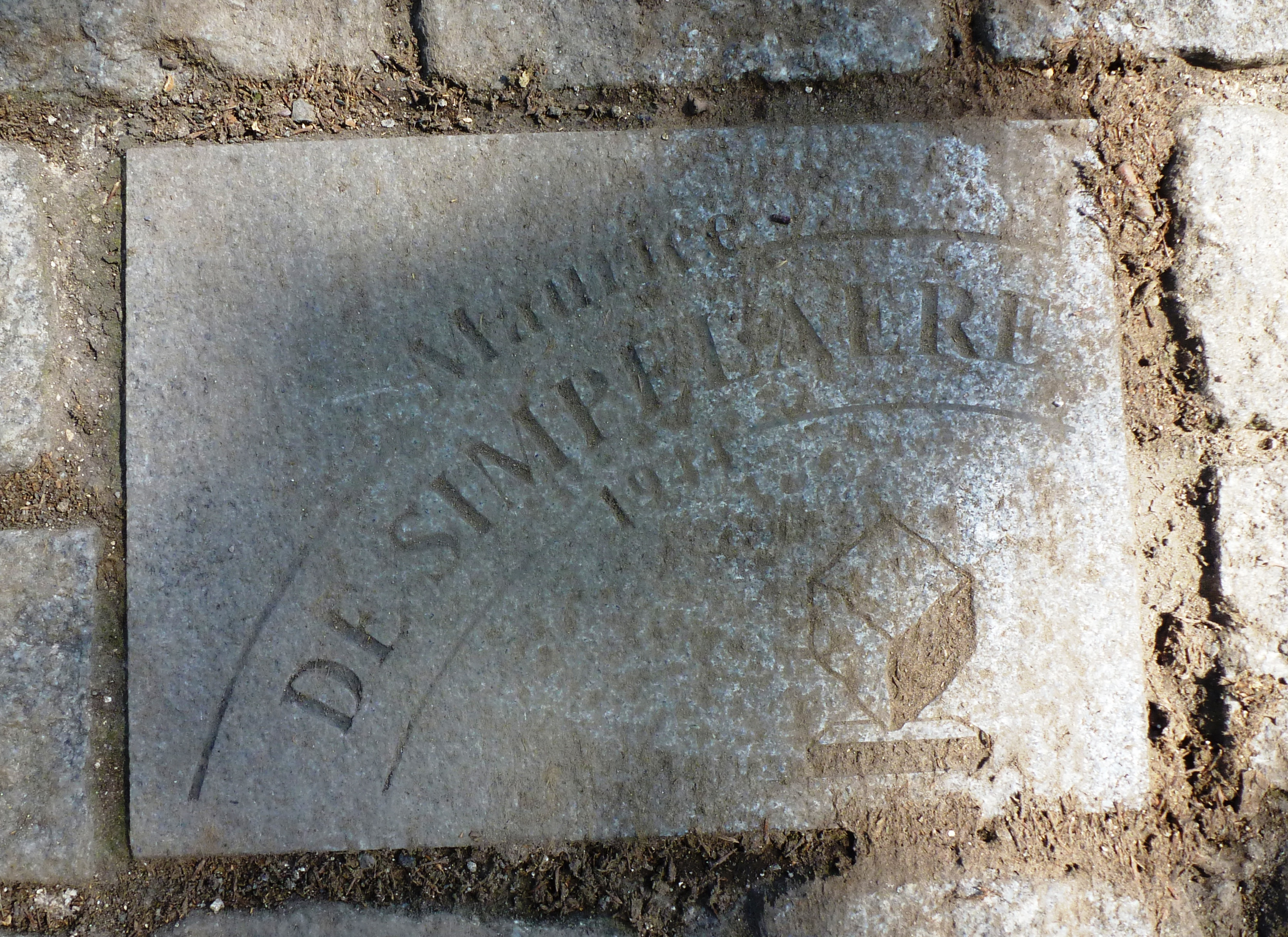 Pflasterstein für Maurice De Simpelaere auf der Allée Charles Crupelandt in Roubaix